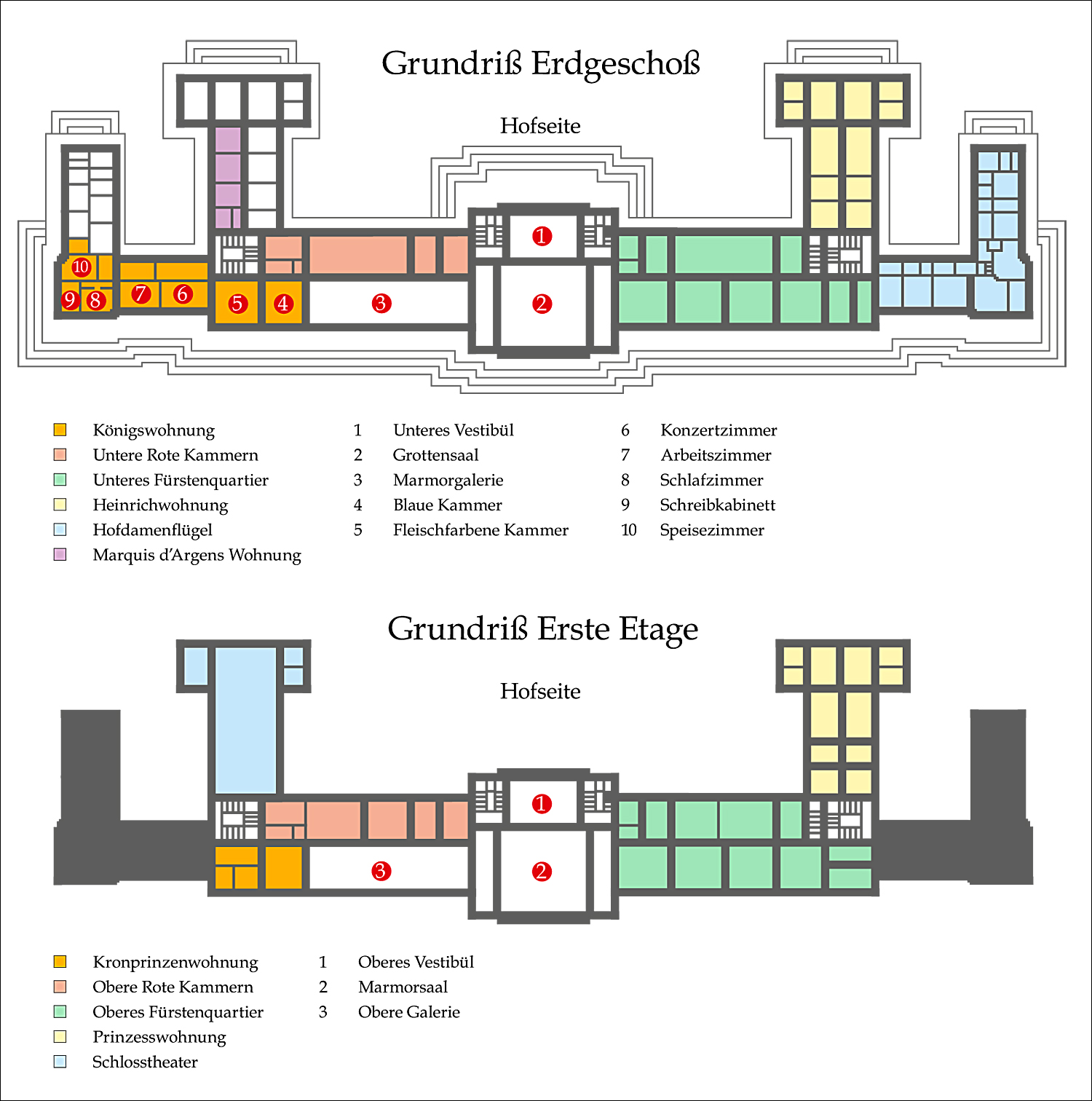 Grundriss Neues Palais Deutschlands